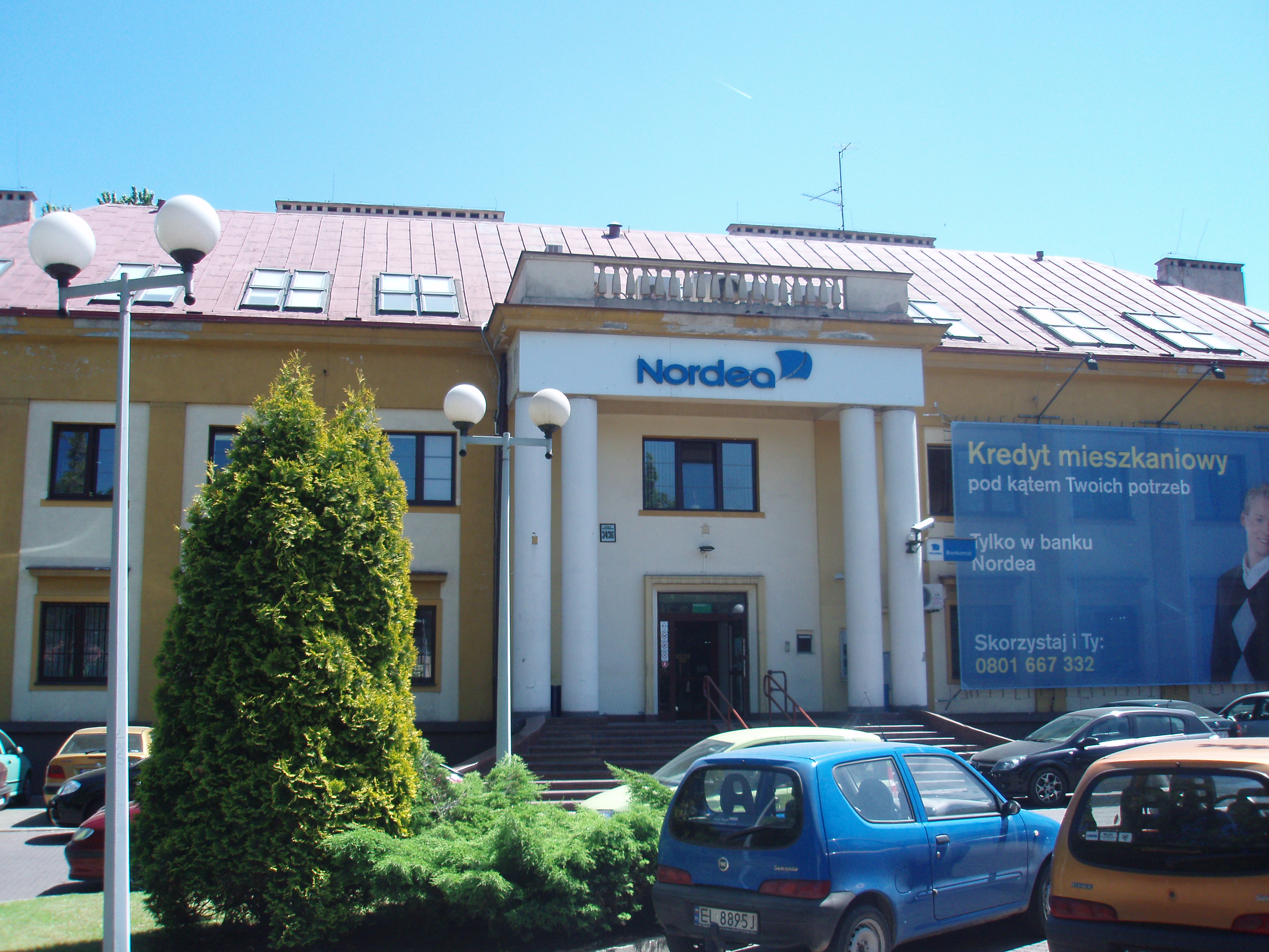 Rzgowska 34, obecnie filia banku Nordea, dawniej Łaźnie Miejskie